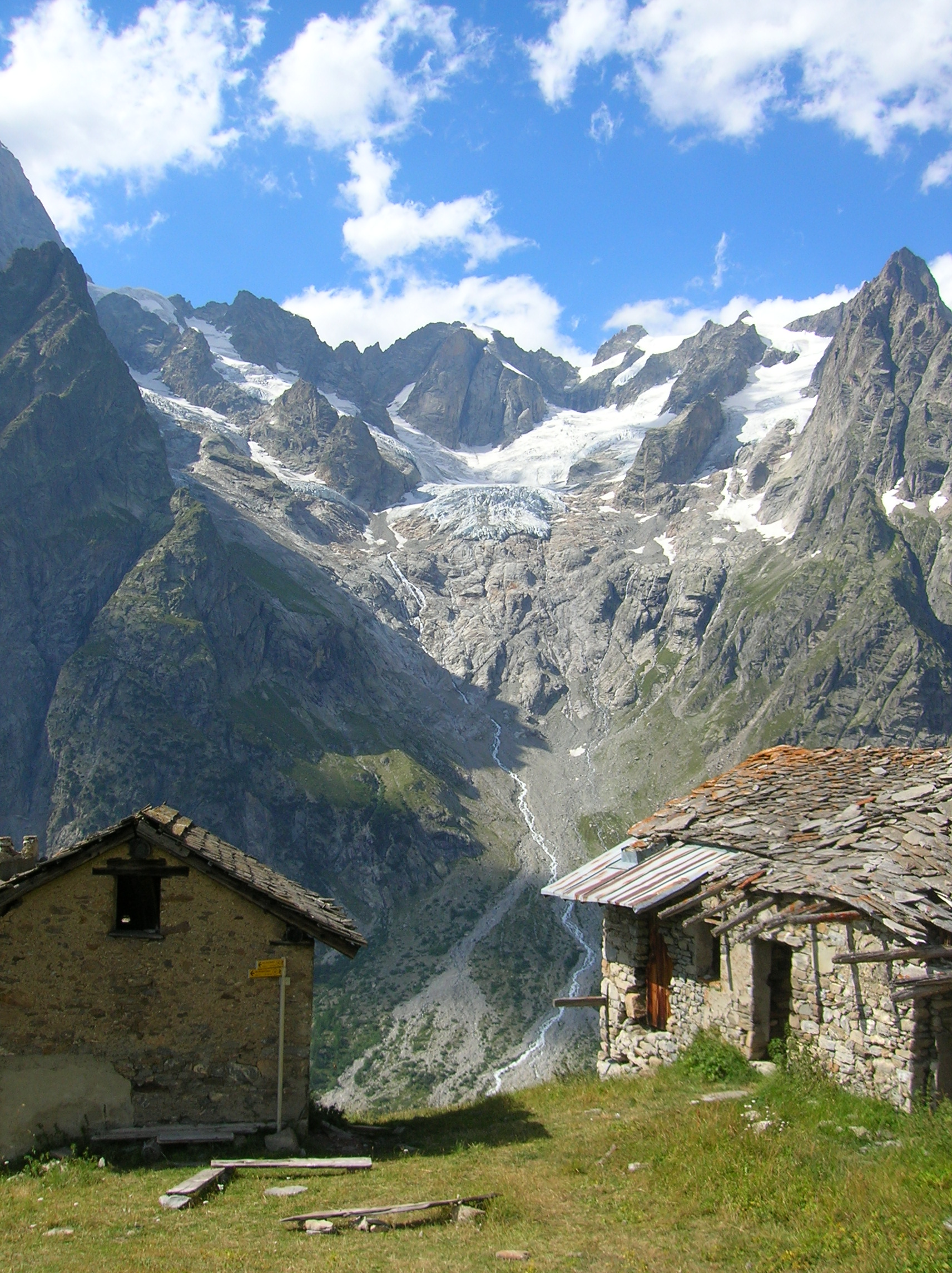 Val Ferret, lungo il Tour du Mont Blanc (TMB). Val Ferret, comune di Courmayeur, Valle d'Aosta, Italia.